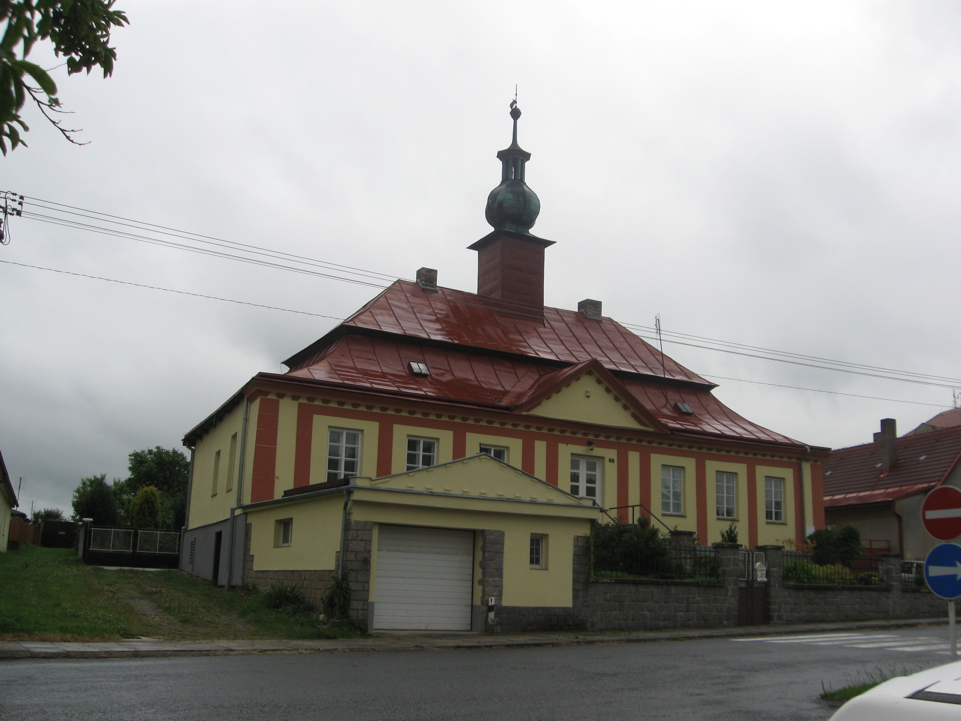 Košetice, nový zámek